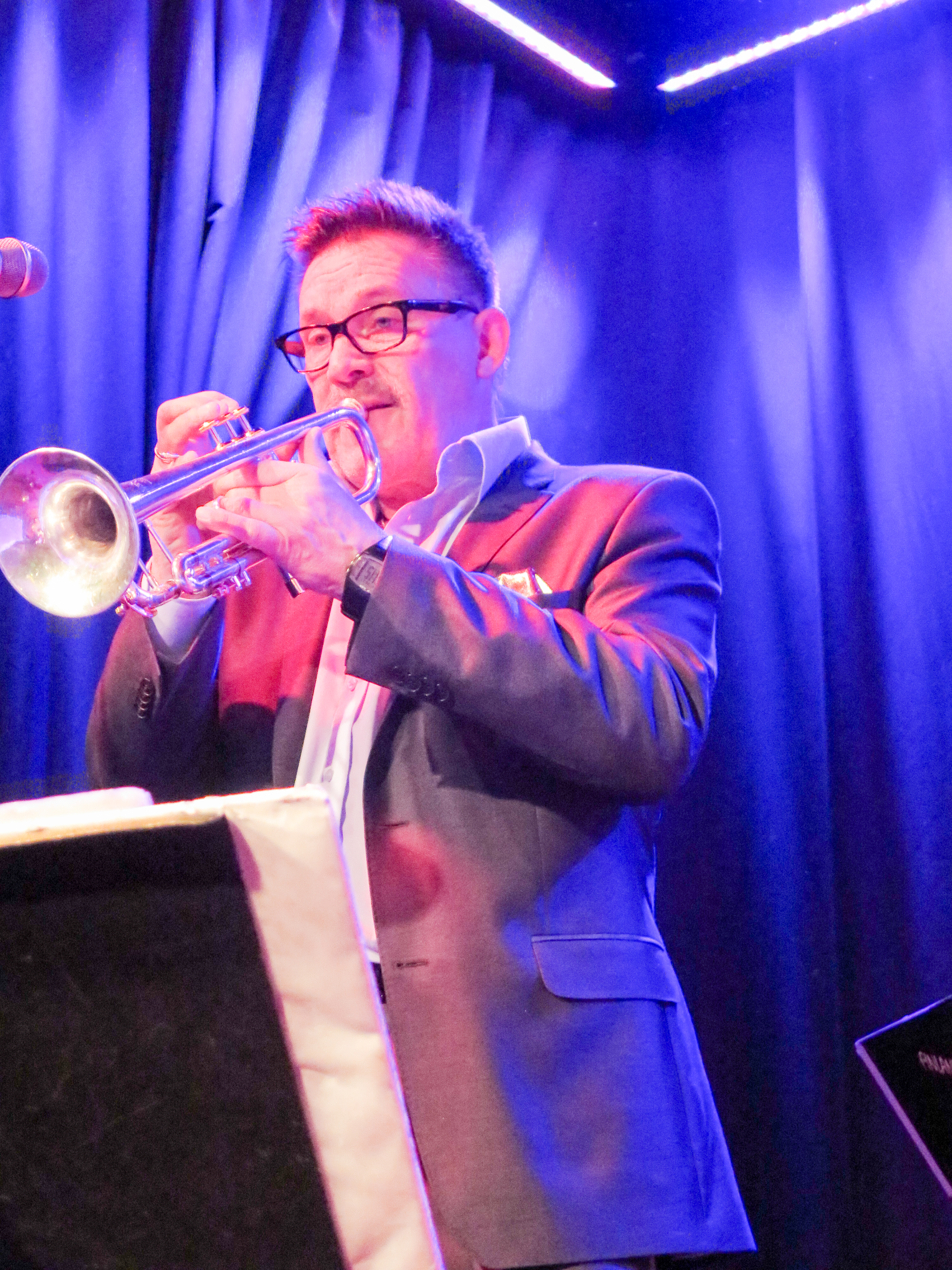 Kari Lehtomäki suomalainen trumpetisti